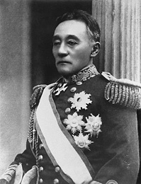 Portrait of Kawamura Sumiyoshi (川村純義, 1836 – 1904)